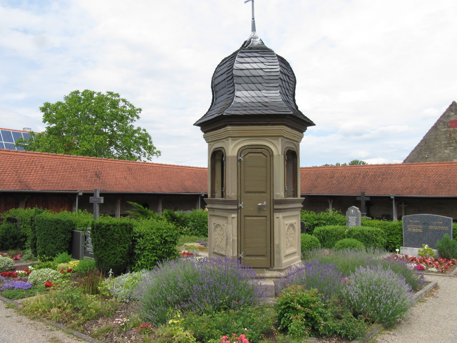 Arkaden mit zugehöriger freistehender Kanzel aus dem Friedhof in Wiesenbronn